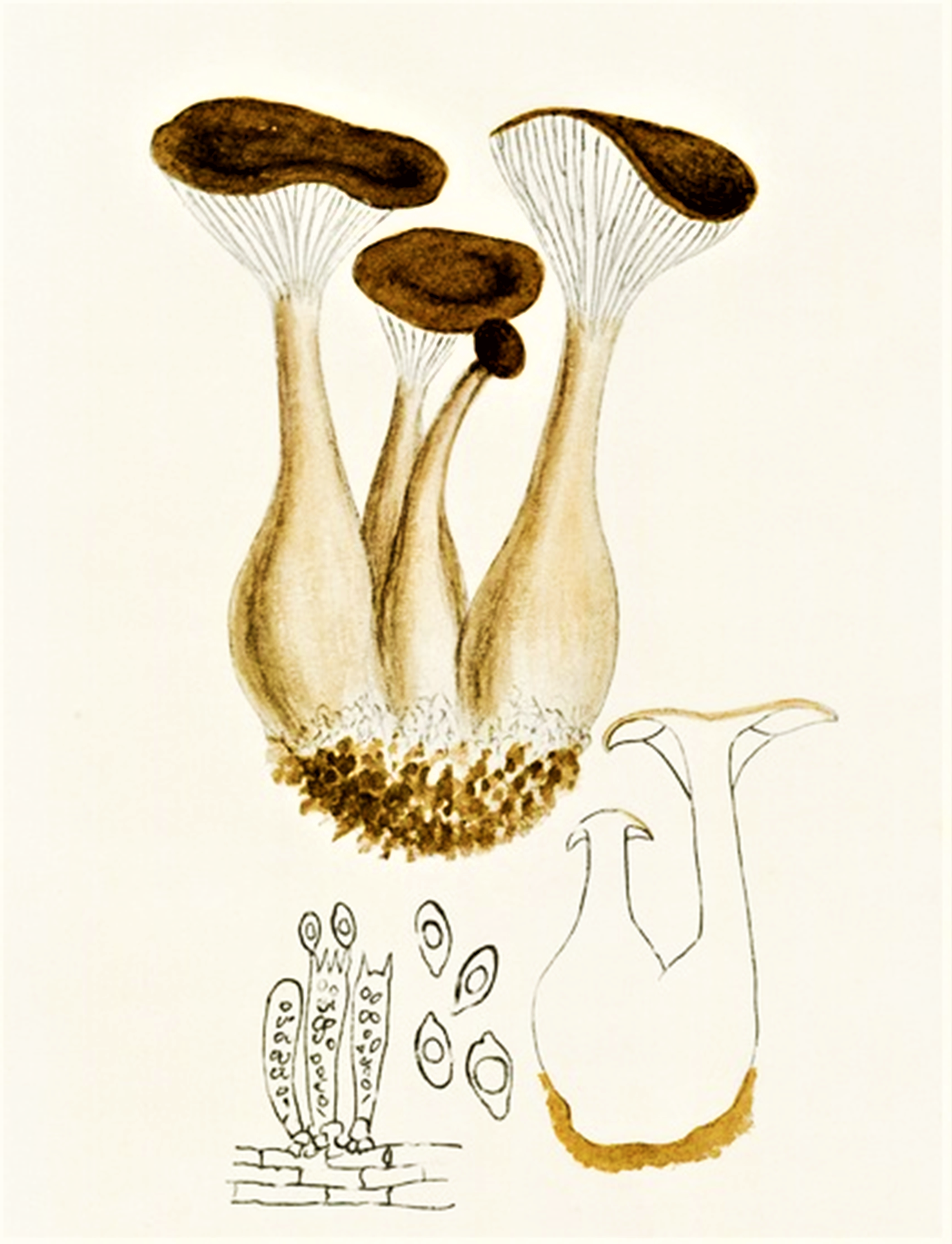 Giacomo Bresadola: Clitocybe clavipes (Pers., 1801) P.Kumm. (1871)